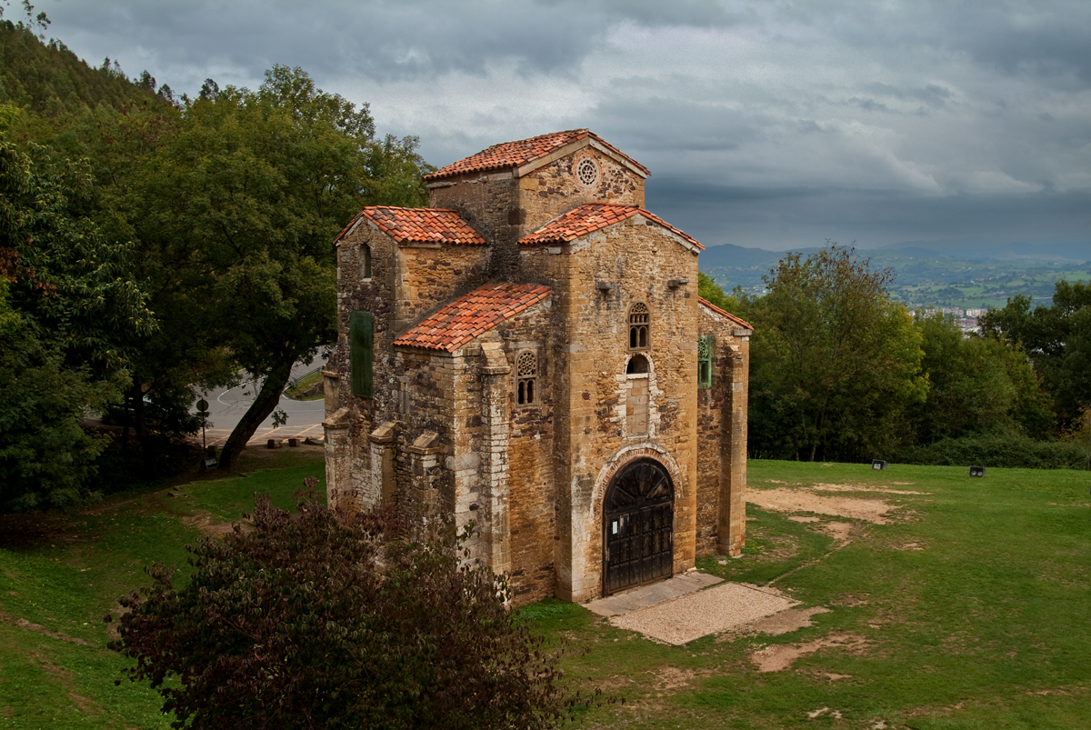 Iglesia de San Miguel de Lillo